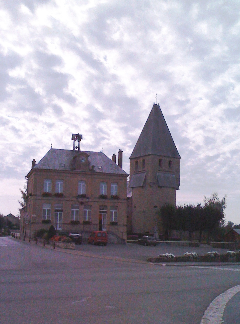 La Place du Château dans le village de Tournes.